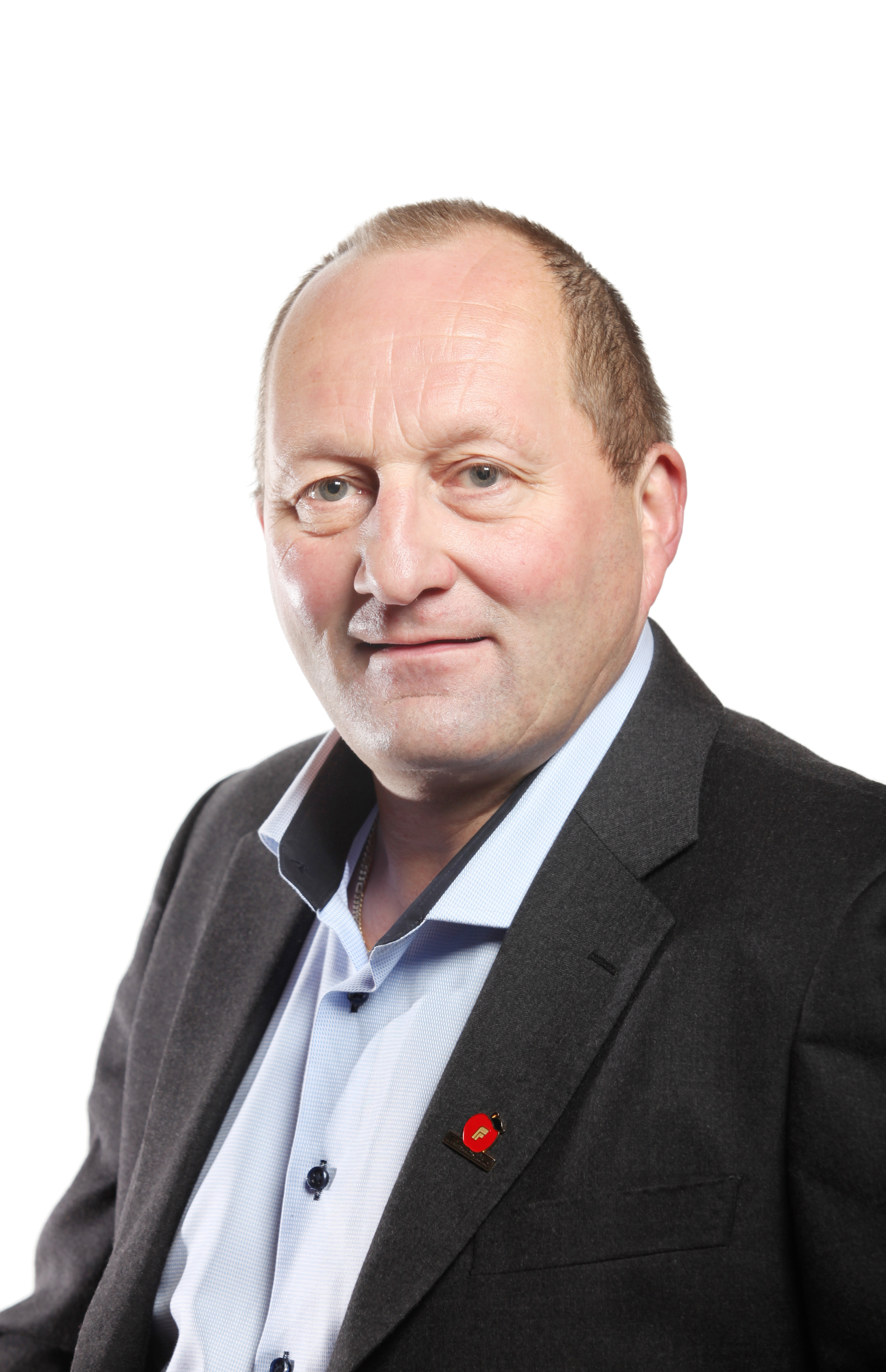 Medlem av næring- og kulturkomitéen og kontrollutvalget. Foto: Kenneth Hætta / Sametinget.